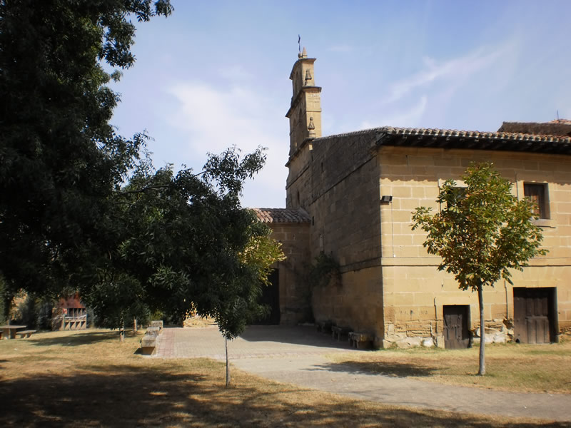 Fotografia de la Ermita de Junquera (La Rioja)